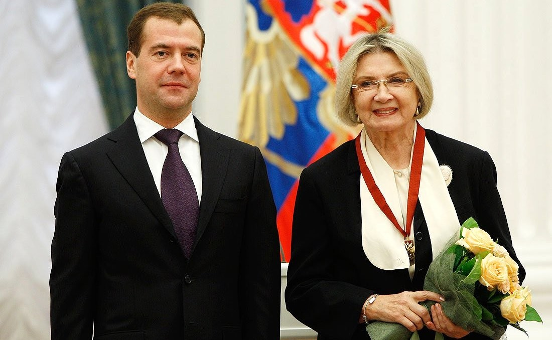 Орденом «За заслуги перед Отечеством» III степени награждена артистка театра и кино Алла Демидова